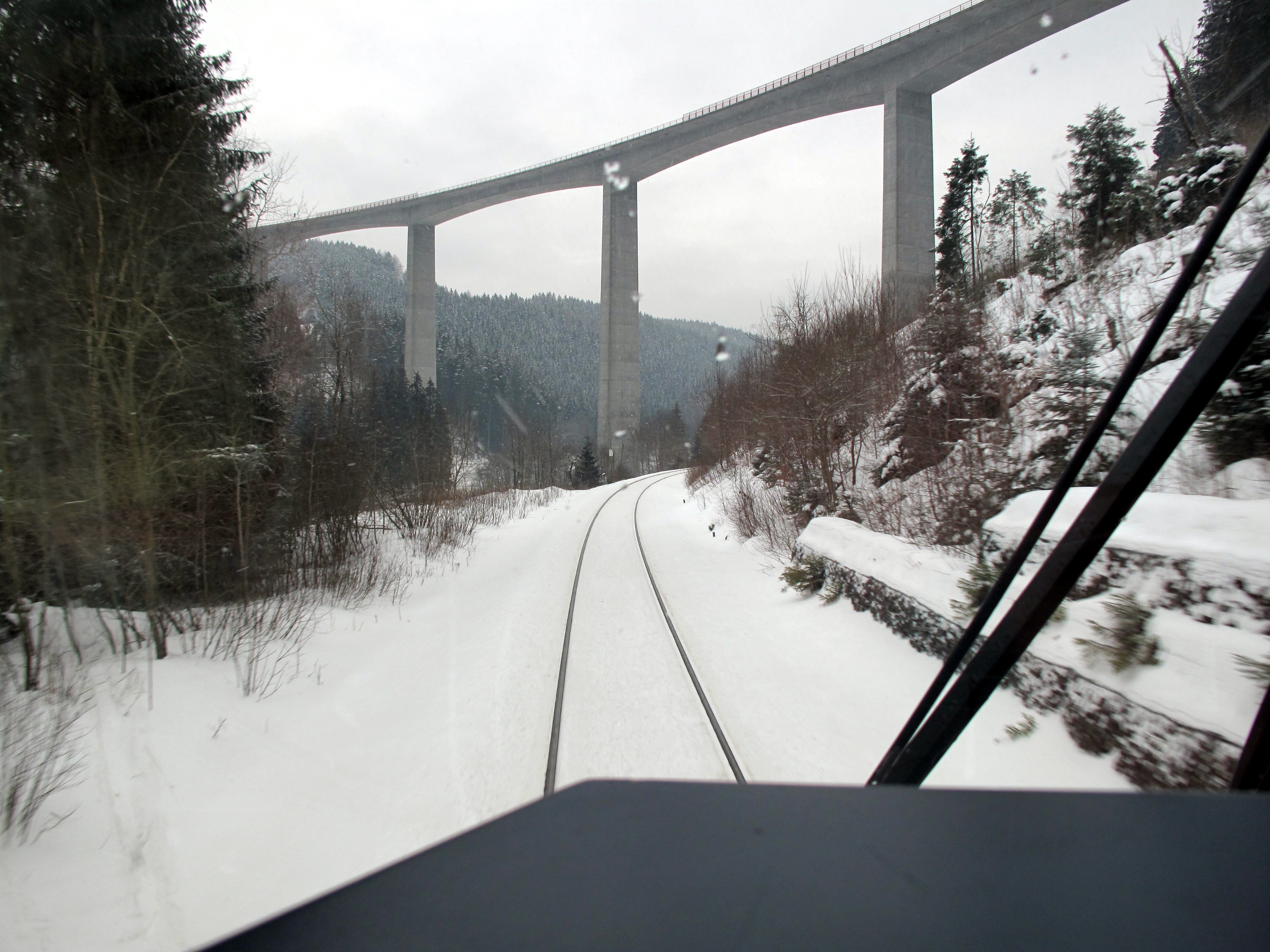 Die Gutachtalbrücke in Titisee-Neustadt von der Höllentalbahn aus gesehen